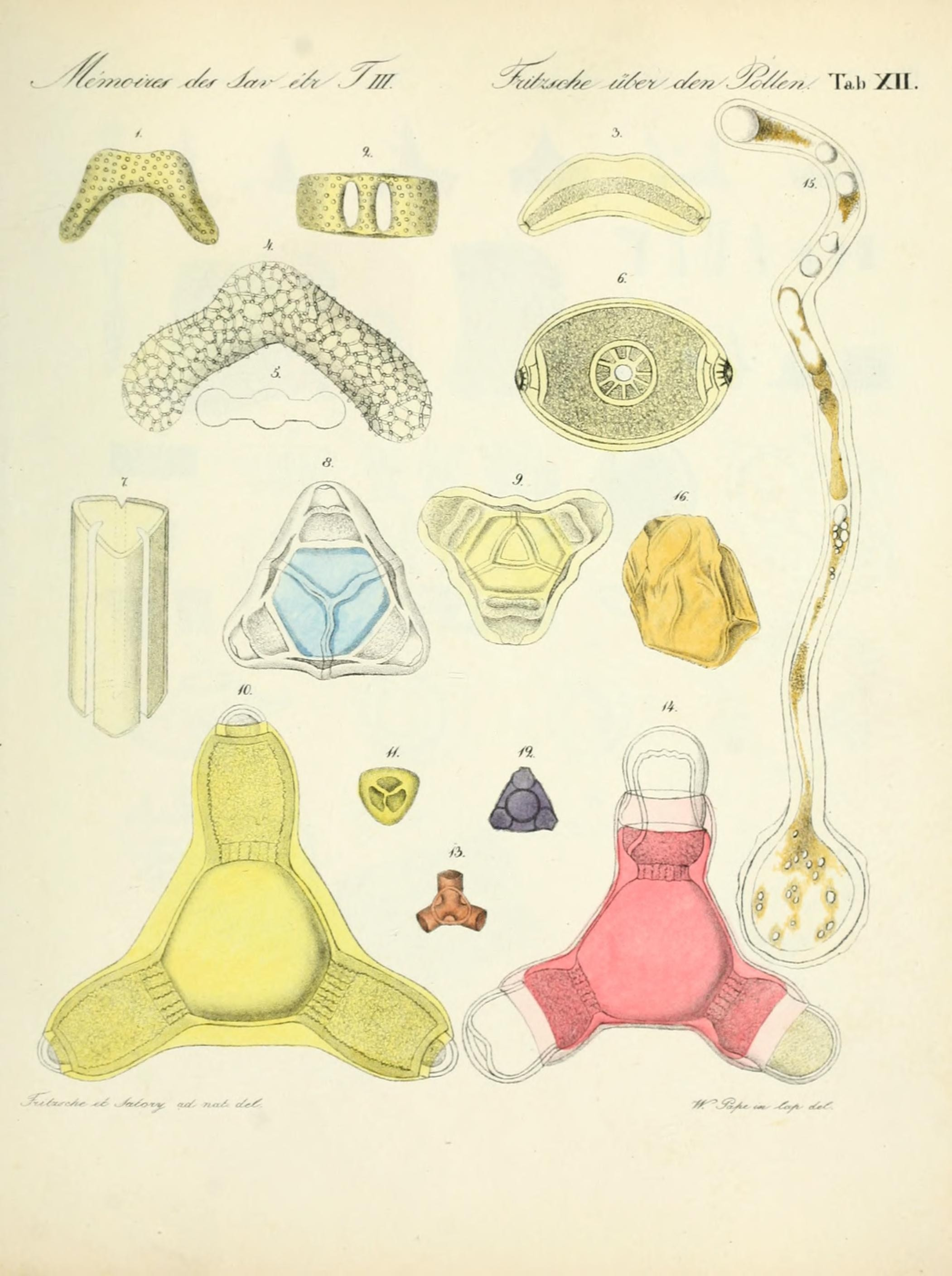 ^/r/y/r.'^■^:f ./r^ v^y r/r ////. 3^ ^//y'Y r/r/i.'\l/.9/ZTy/ 'rä.l)XII. iXf^Sä/U — -/Syt ,.4^